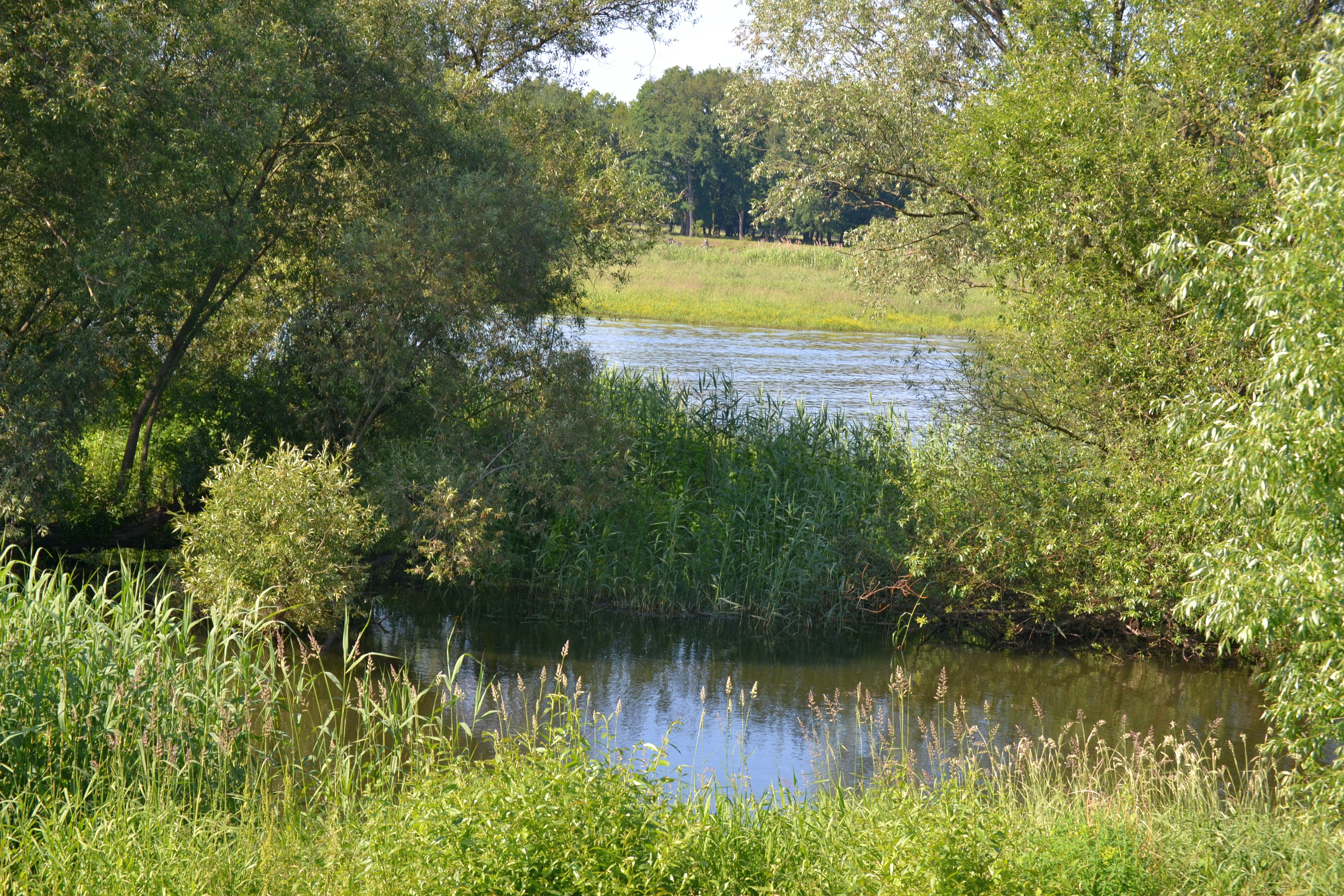 Badestelle am Oderarm in Kienitz/Letschin am Oder-Neiße-Radweg; Teil des LSG „Odervorland Groß Neuendorf-Lebus“, des FFH-Gebietes „Oderaue Kienitz“ sowie des Vogelschutzgebietes „Mittlere Oderniederung“.